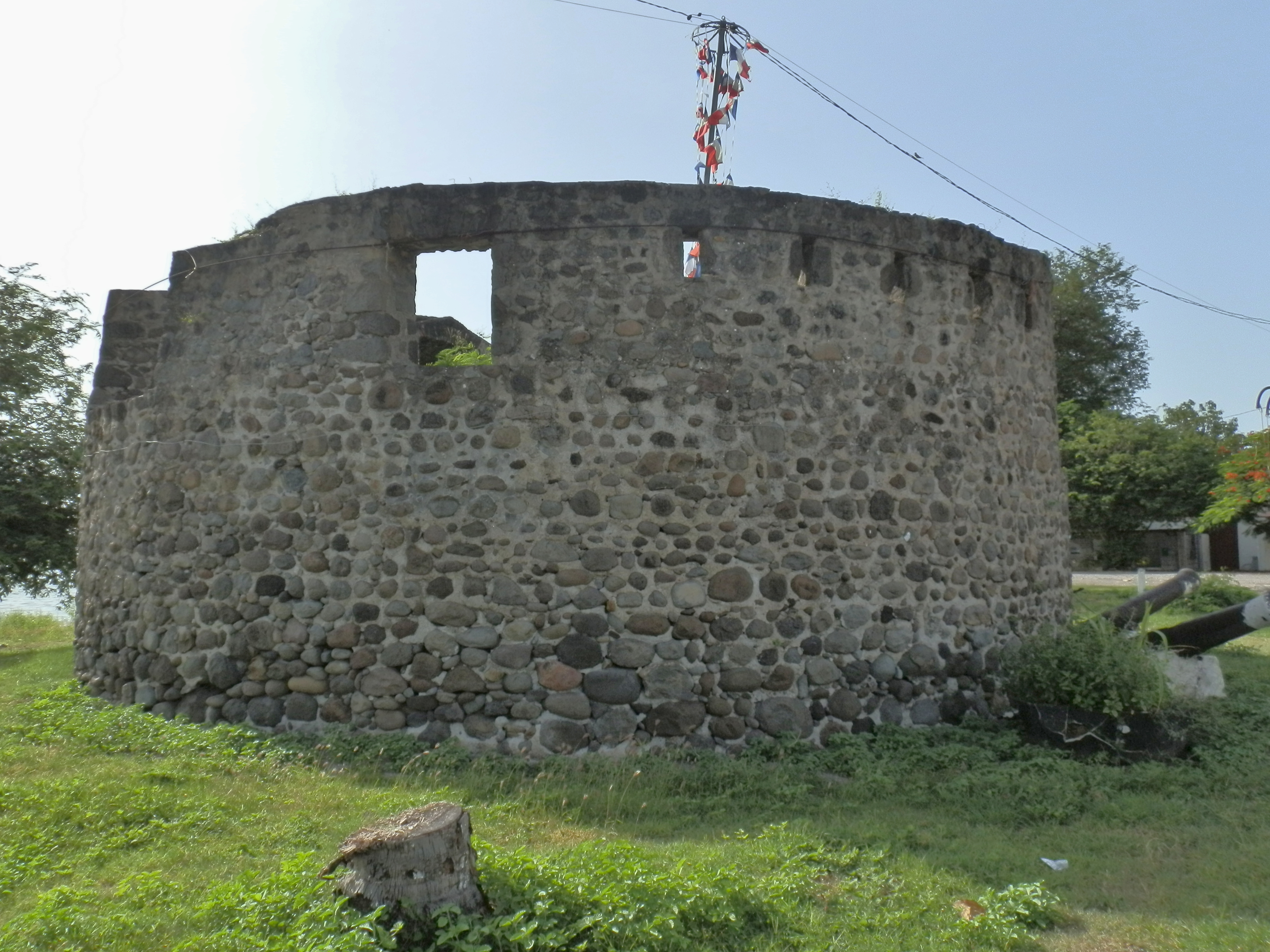 Tour du Père-Labat, (Inscrit, 1979) .